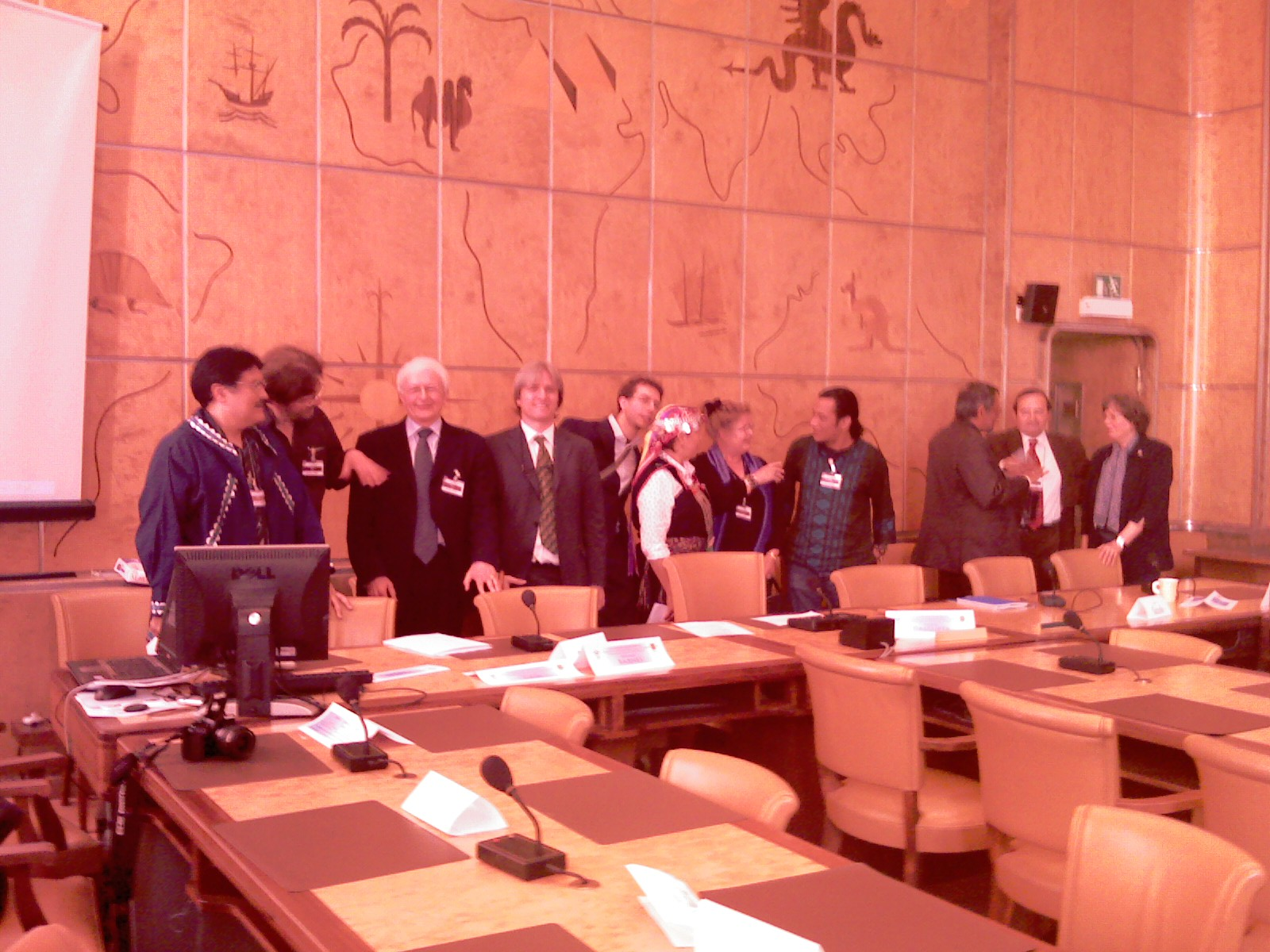 Simposium on Linguistic Rights of Universal Esperanto Association - Simpozio pri Lingvaj Rajtoj de Universala Esperanto-Asocio